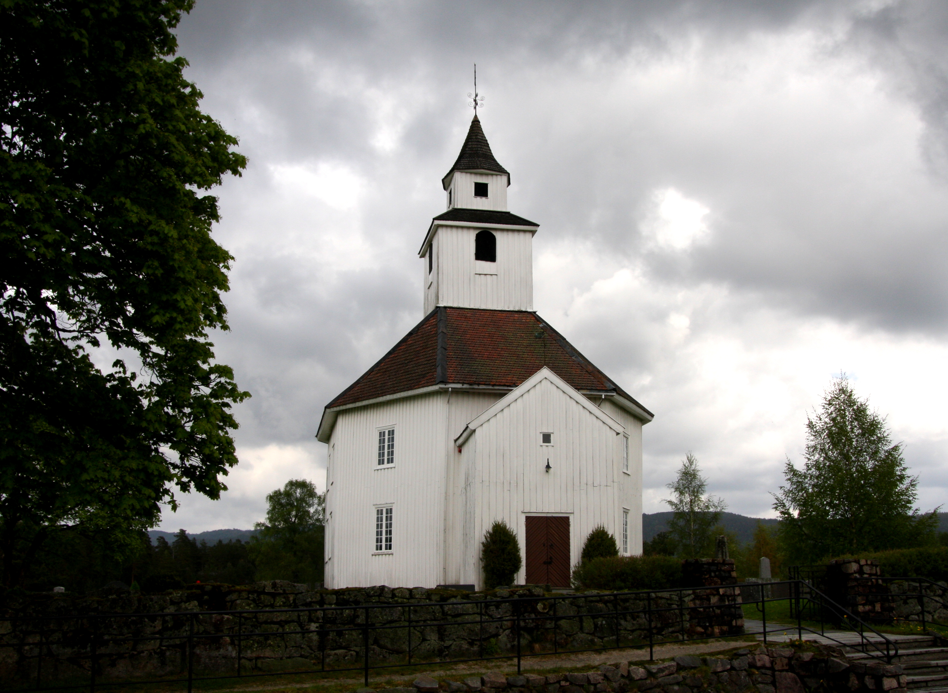 Hornnes kirke